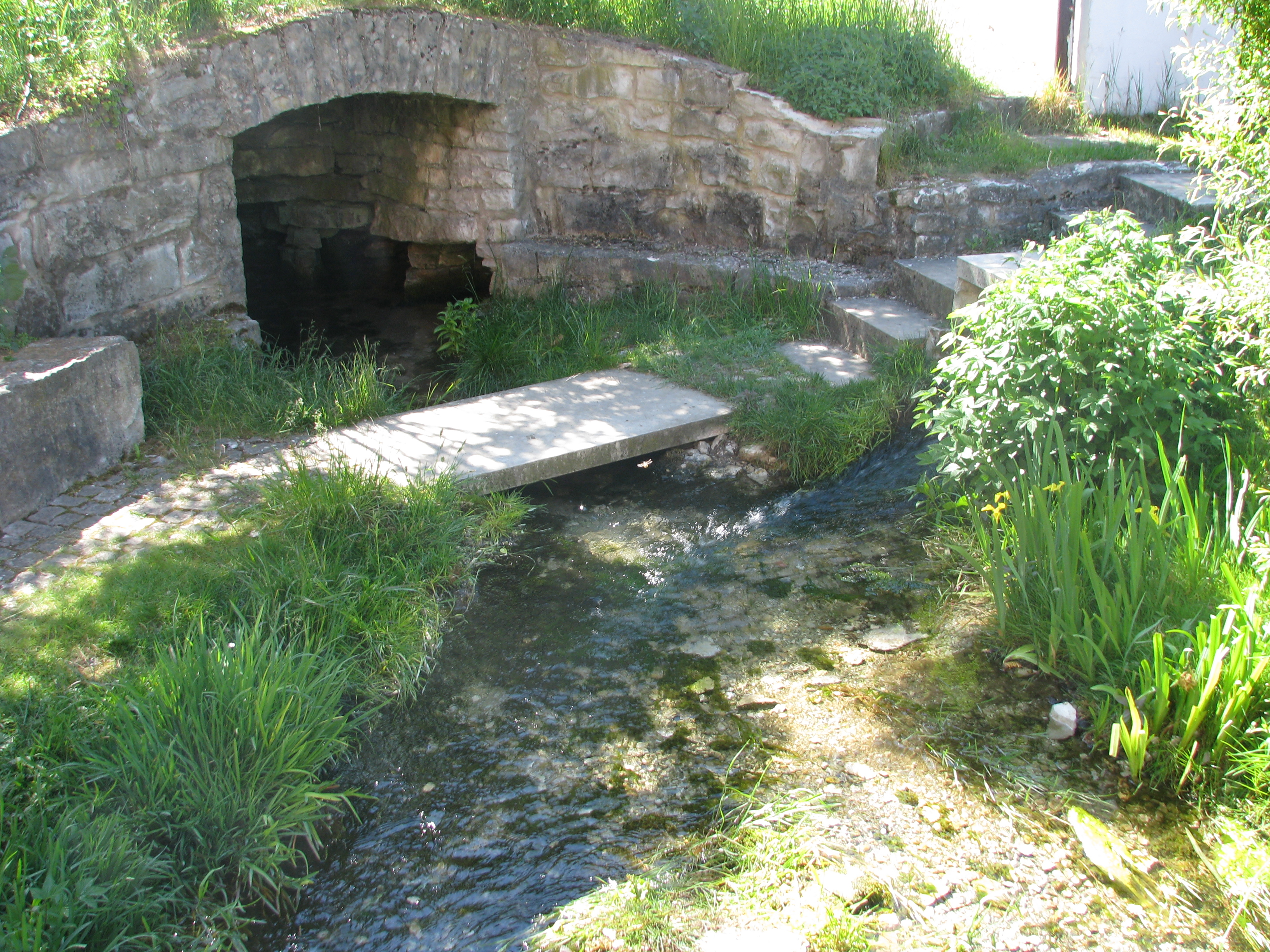 Quellfassung der Schwarzen Laber in Laaber, Ortsteil der Gemeinde Pilsach im Landkreis Neumarkt in der Oberpfalz